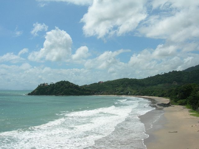 Plaża Kantiang na wyspie Lanta